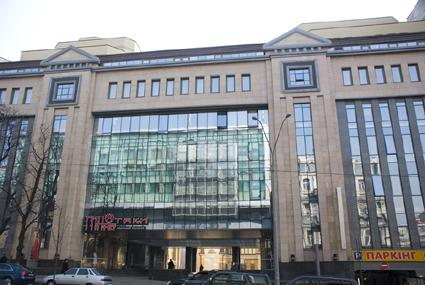 Orga Systems, Kiew